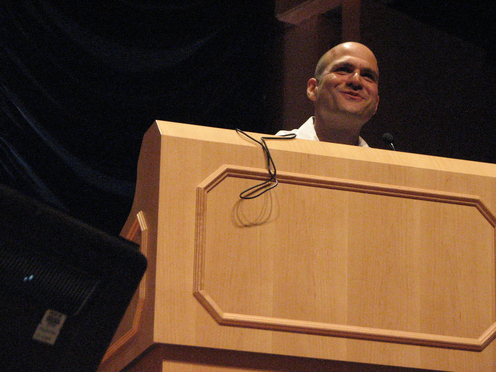 Farzad Mostashari